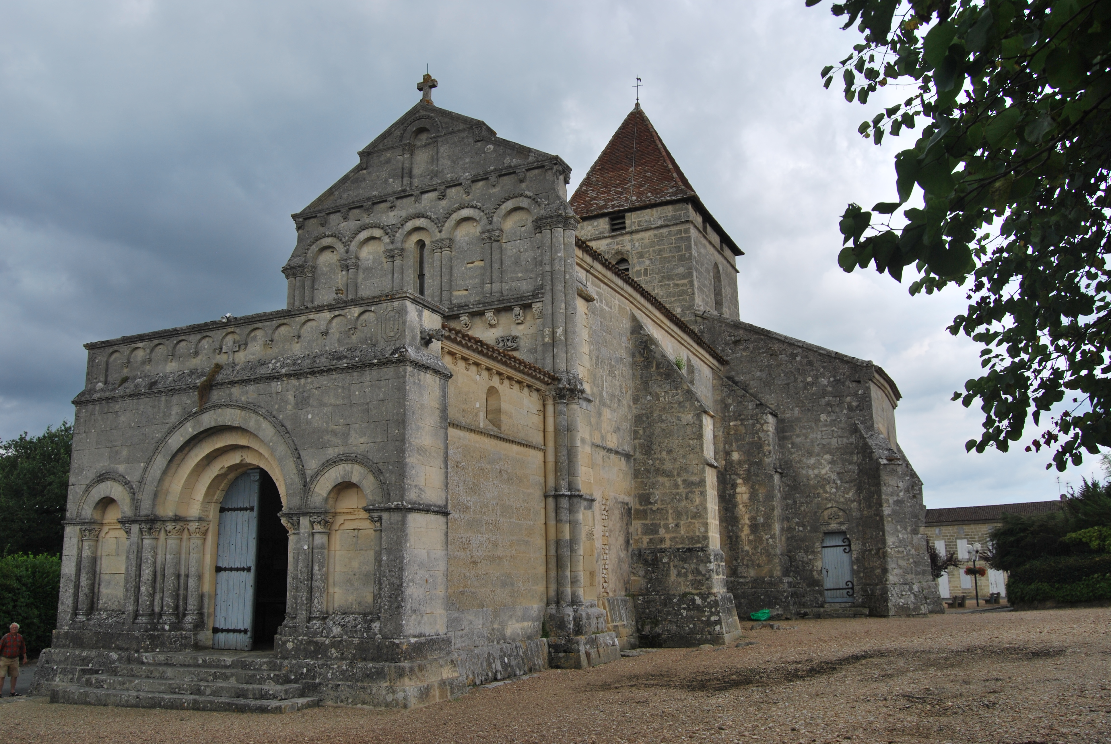 Église de Saint-Philippe-d'Aiguille